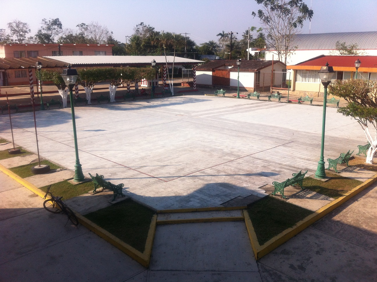 Parque Central de Tuxtilla